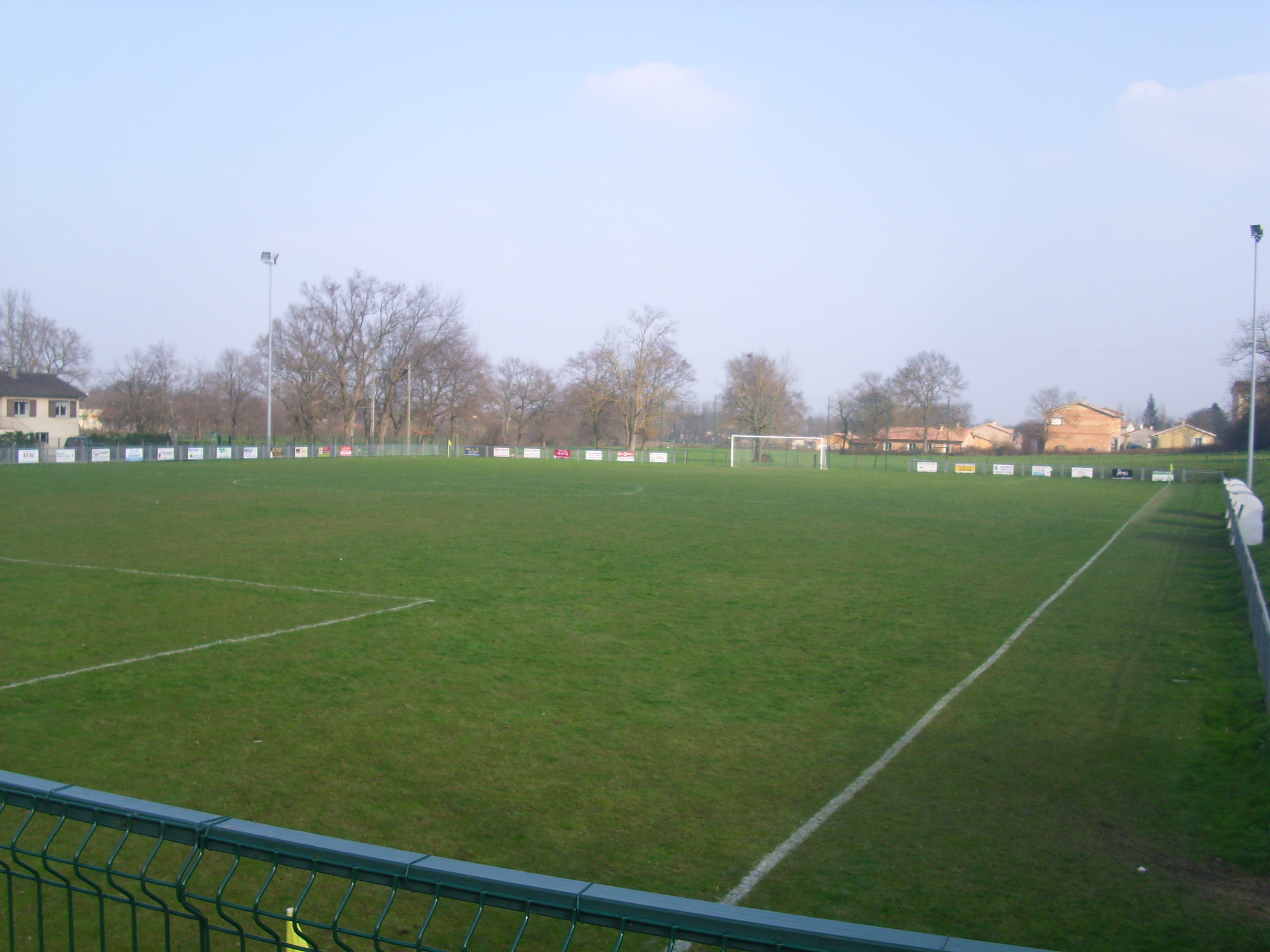 Stade de football de La Chapelle de Guinchay (71)